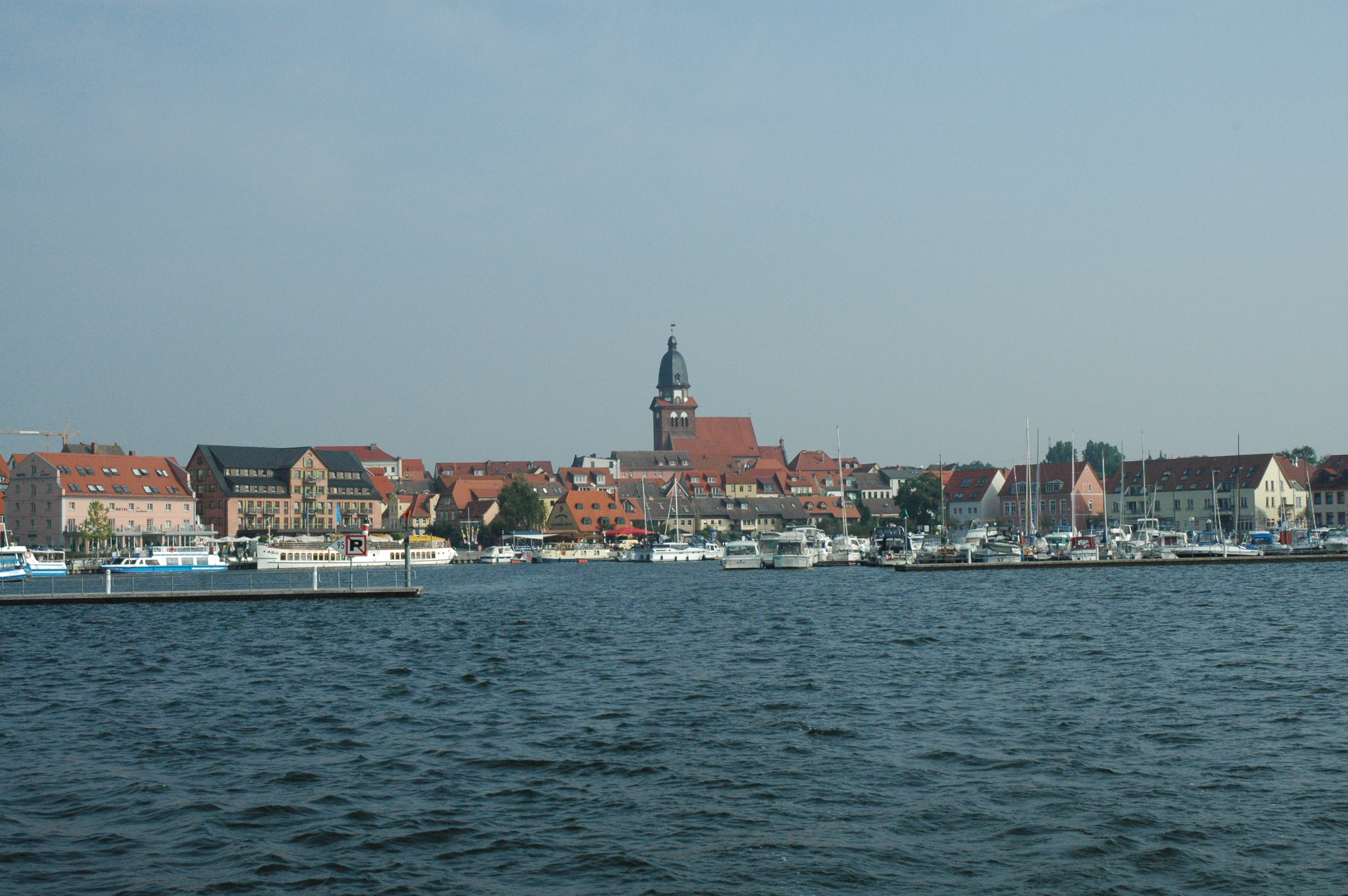 Stadthafen Waren an der Müritz von der Binnenmüritz aus gesehen.